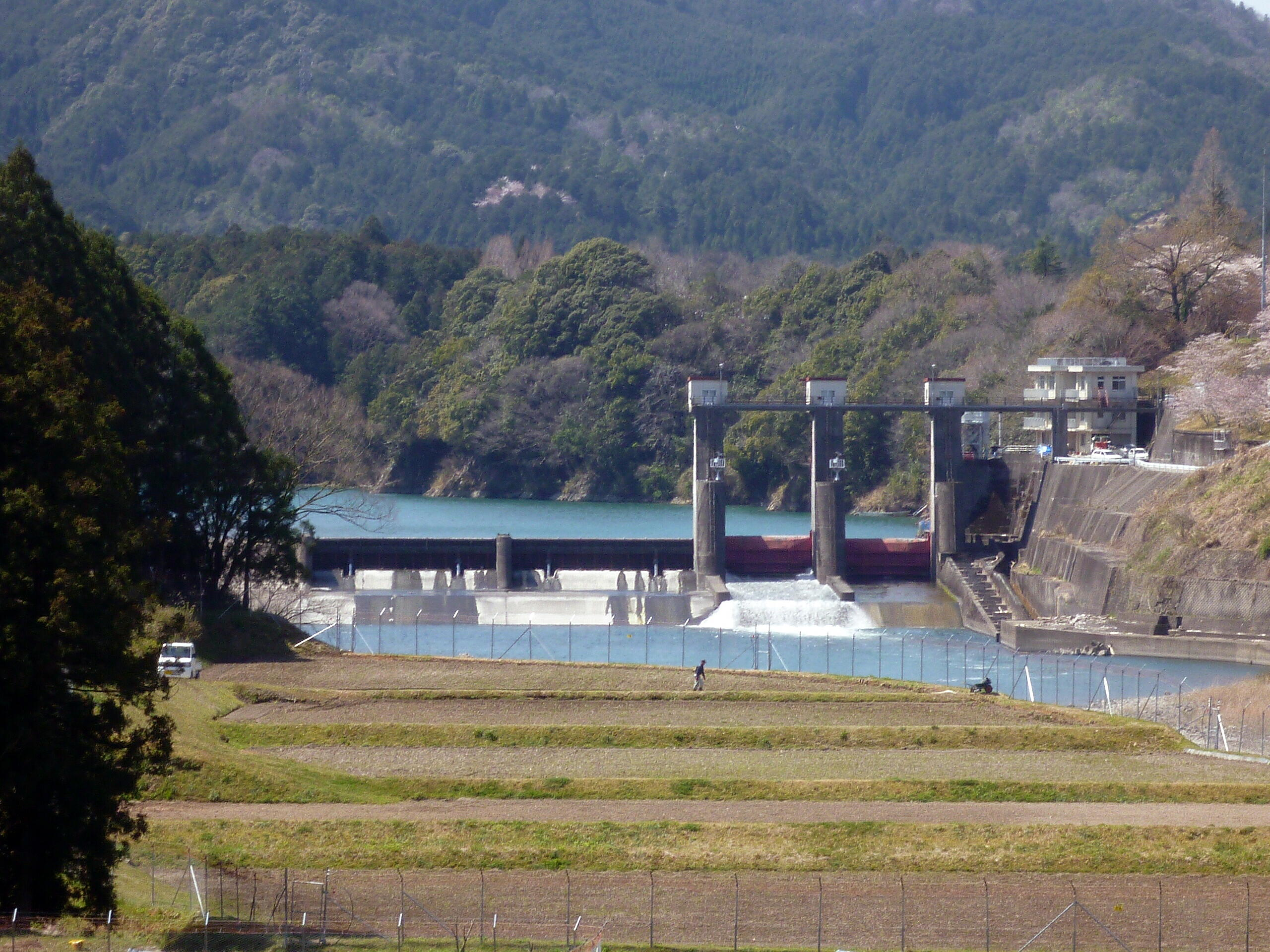 七保大橋から見た宮川用水粟生頭首工